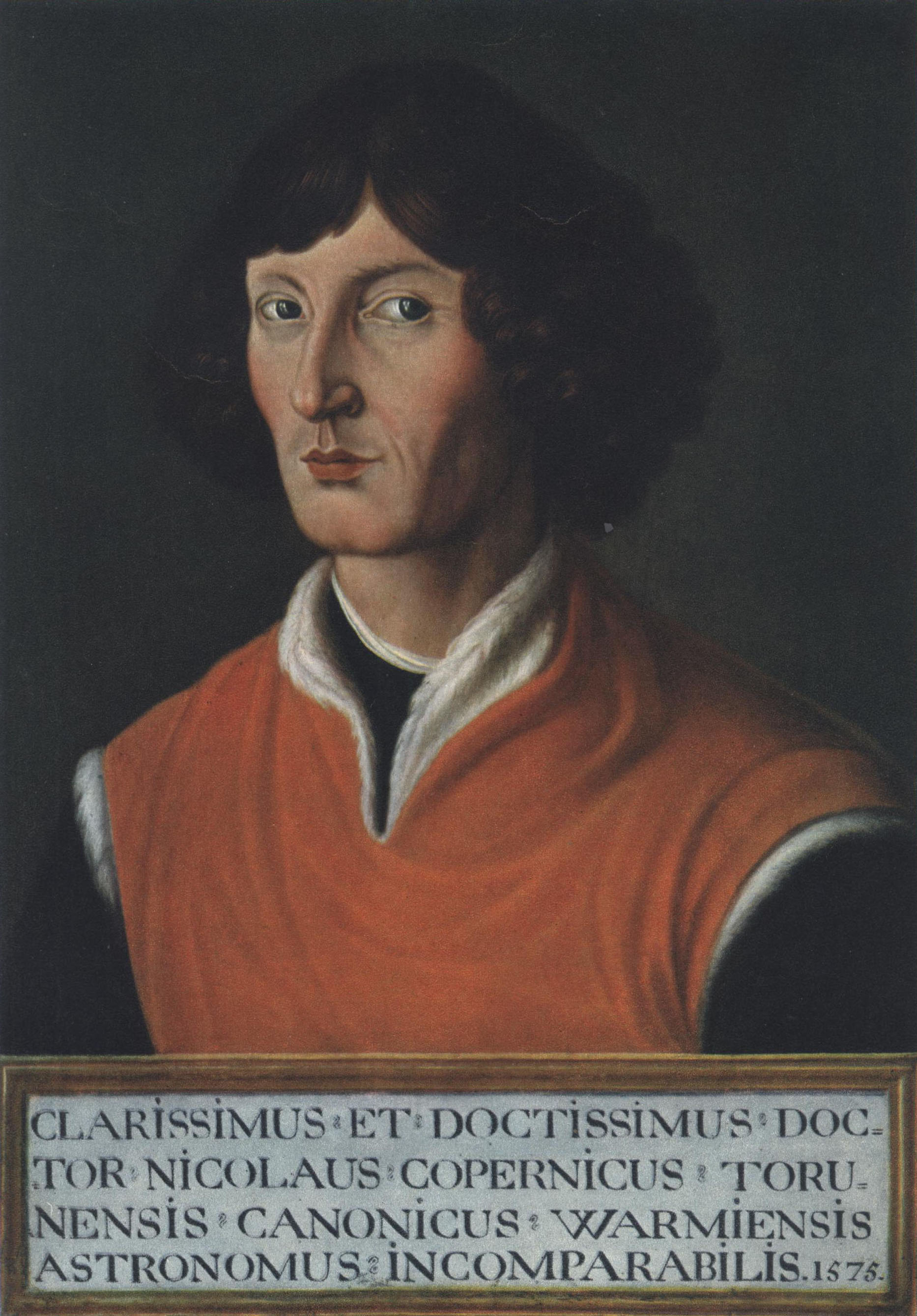 Nicolaus Kopernikus, Kopie eines alten Gemäldes das von 1575 stammen soll, heute im Besitz der Staatsbibliothek Krakau